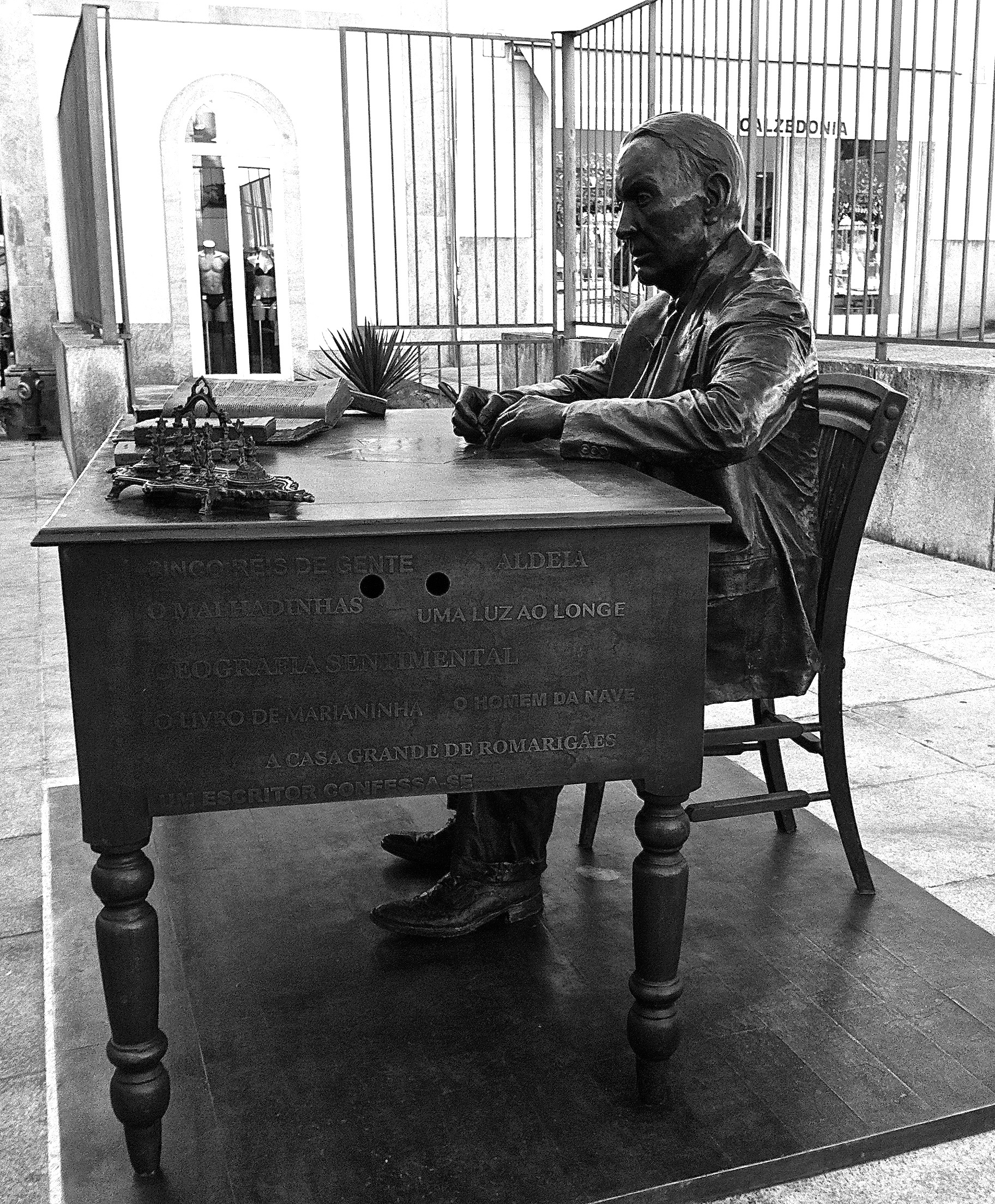 Statue of Aquilino Ribeiro, Viseu, Portugal. Sculptor: Yuraldi Rodríguez Puentes. Year: 2013.